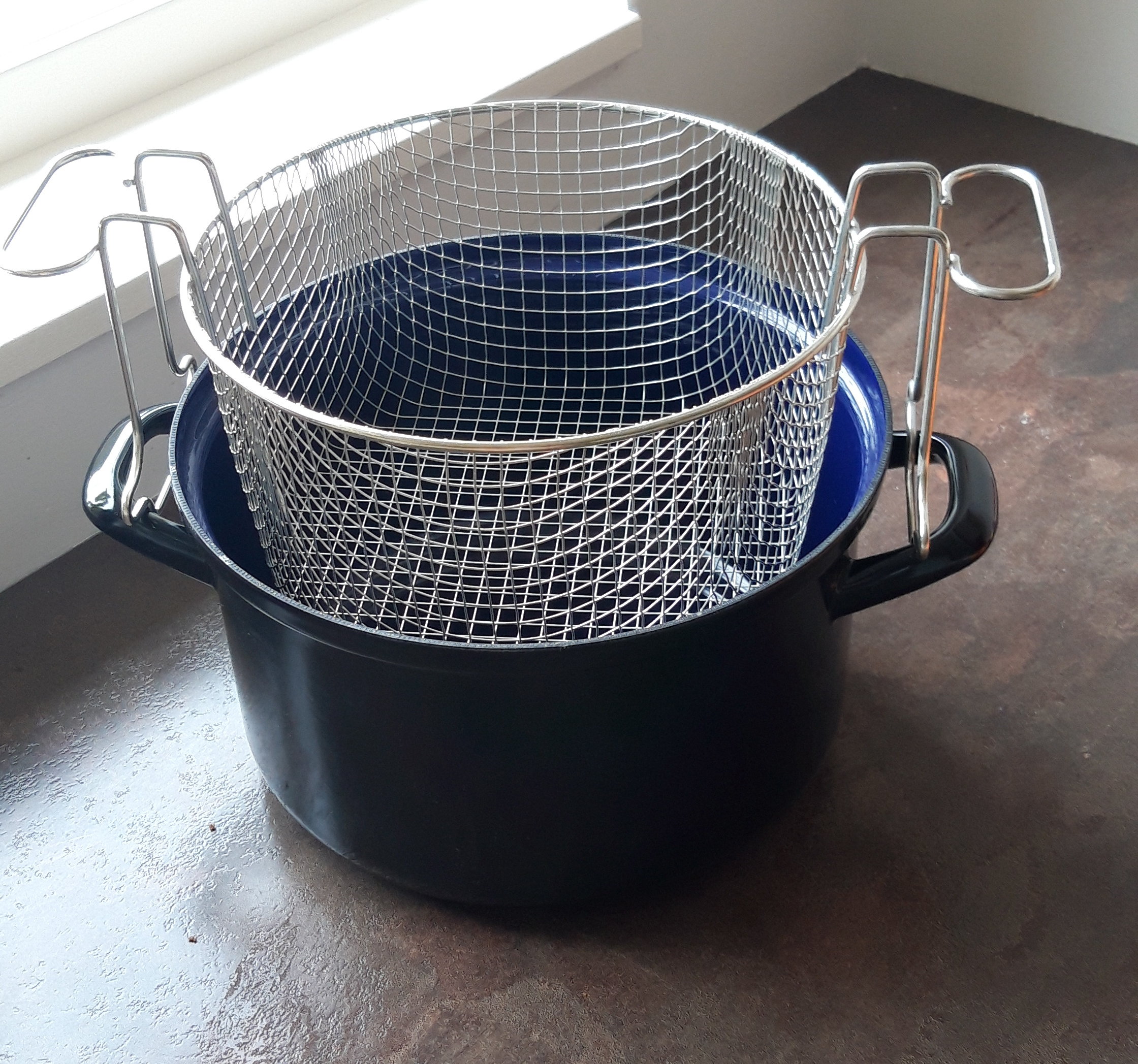 Frituurpan van het merk BK met frietkorf. Maximale inhoud 3 liter olie. Geschikt voor gas, inductie, halogeen etc.